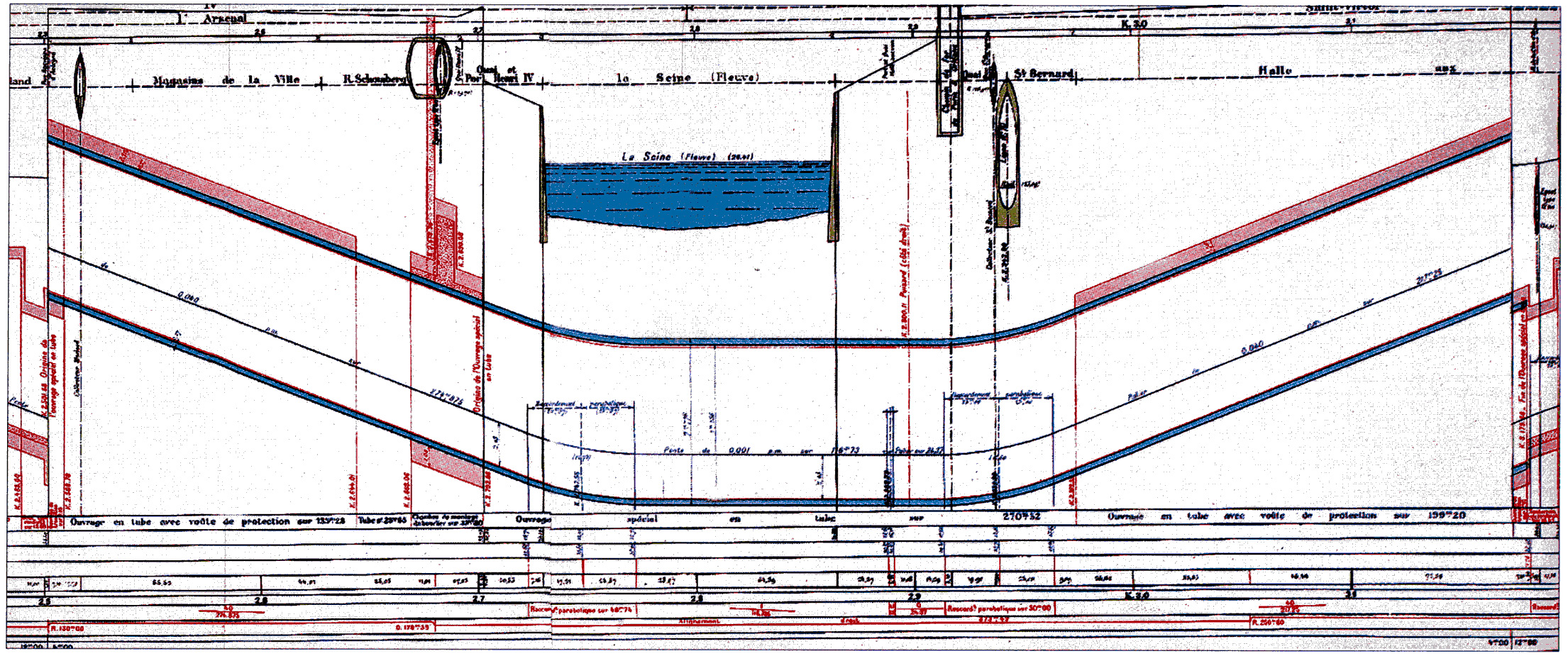 Travaux de la ligne 7 du métro de Paris, France. Profil en long de la traversée sous-fluviale.